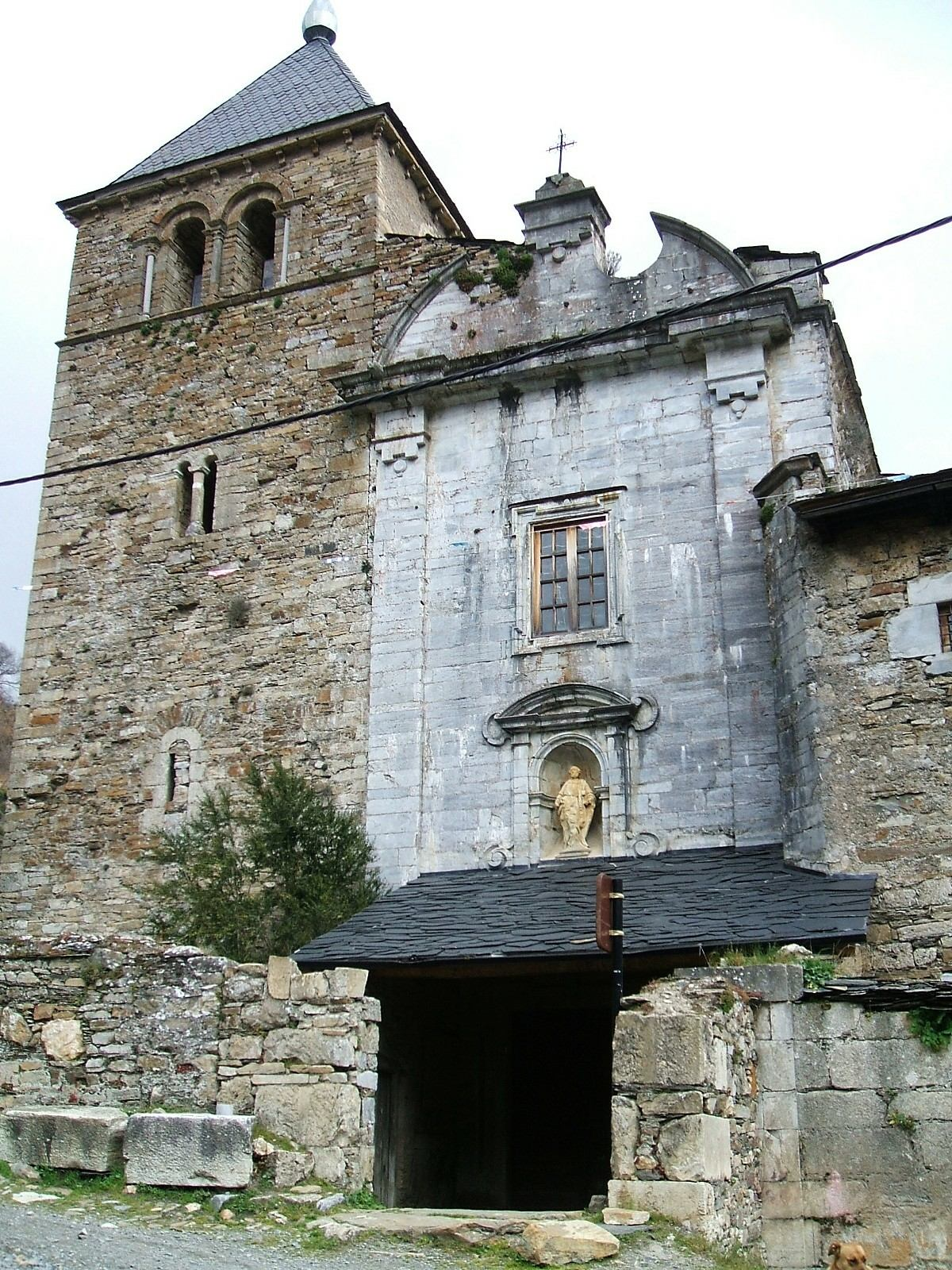 Iglesia del ex Monasterio de San Pedro de Montes, en Montes de Valdueza, El Bierzo, León, España